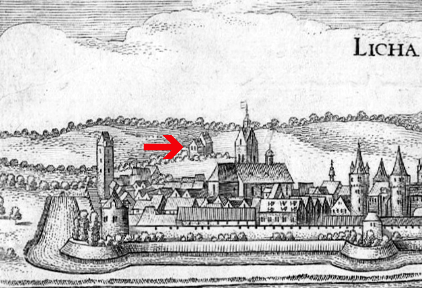 Licha - Auszug aus der Topographia Hassiae, Kupferstich, 20 x 16 cm